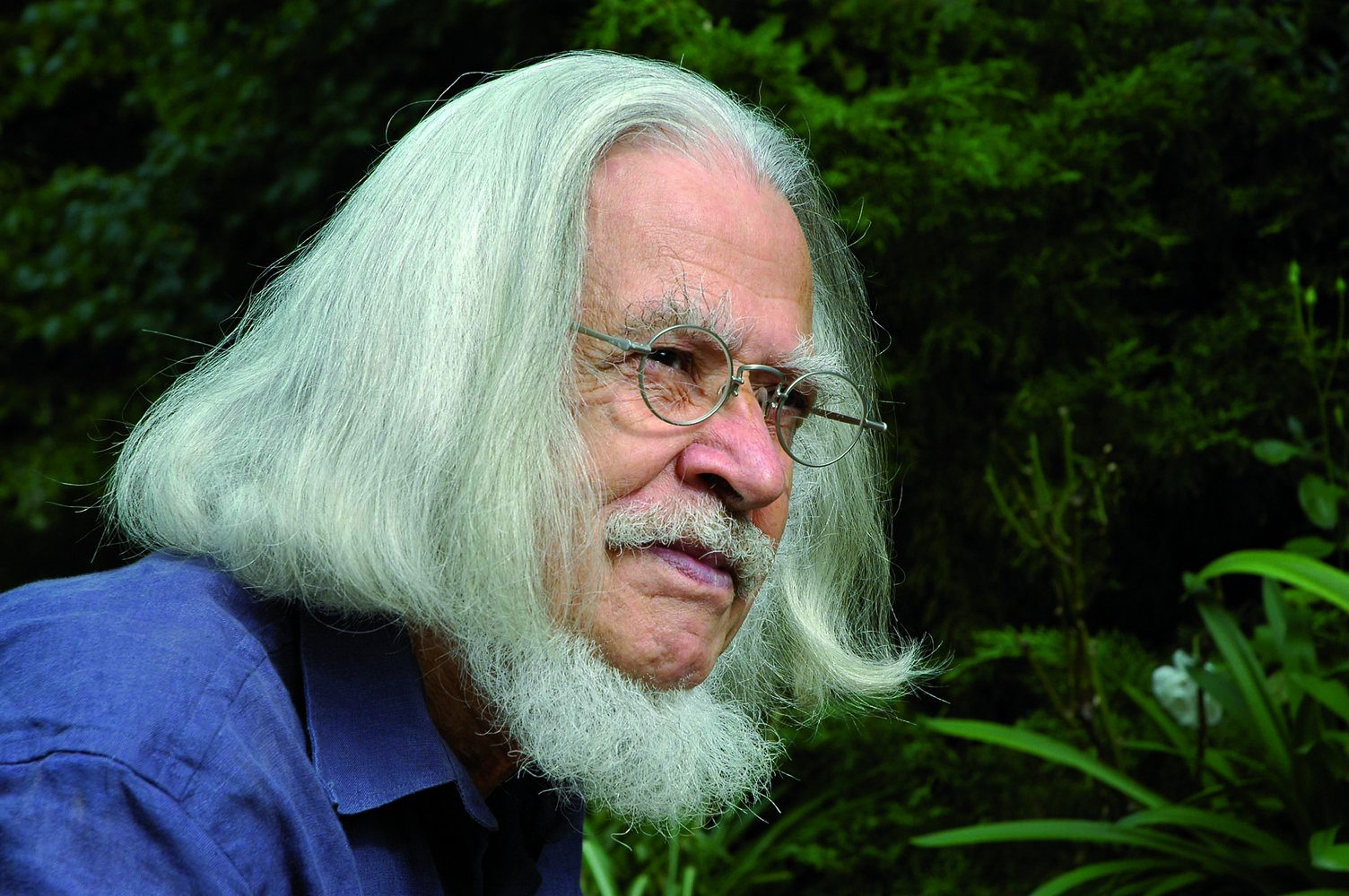 Max Manfred Queißer (1927-2016) Deutscher Philosoph, Kultursoziologe und Künstler